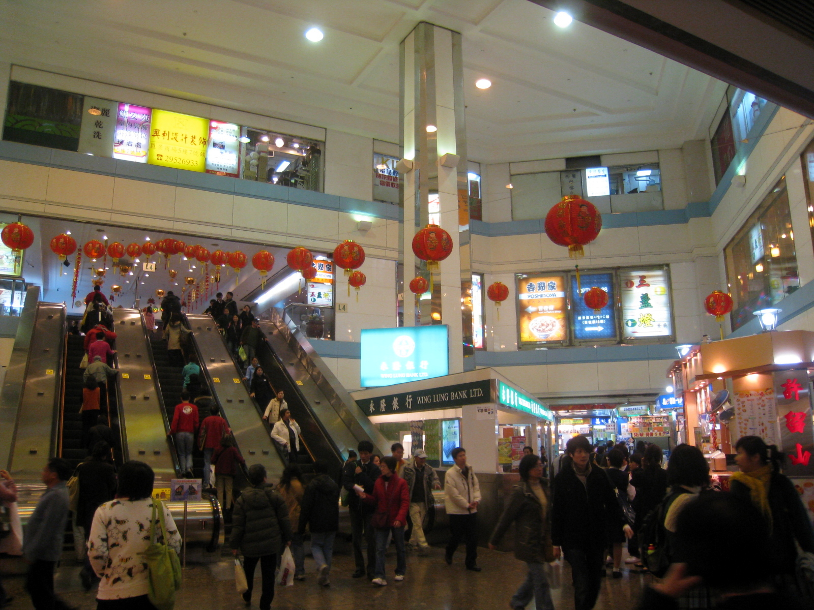 Sceneway Plaza 滙景廣場